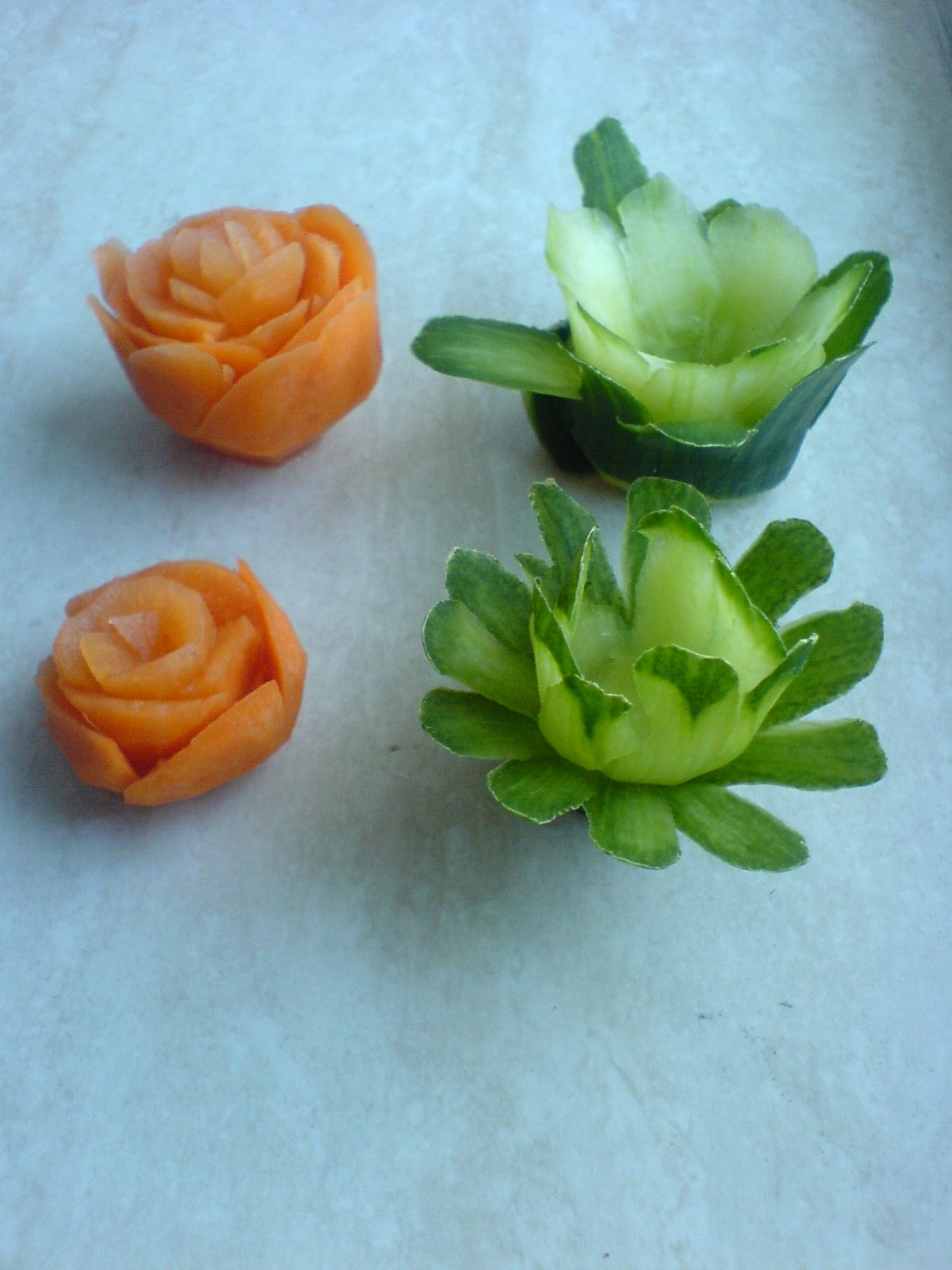 Krip (Thailändische Schnitzerei von Gemüse in Form von Blüten, hier beispielhaft bei Salatgurke und Karotten)